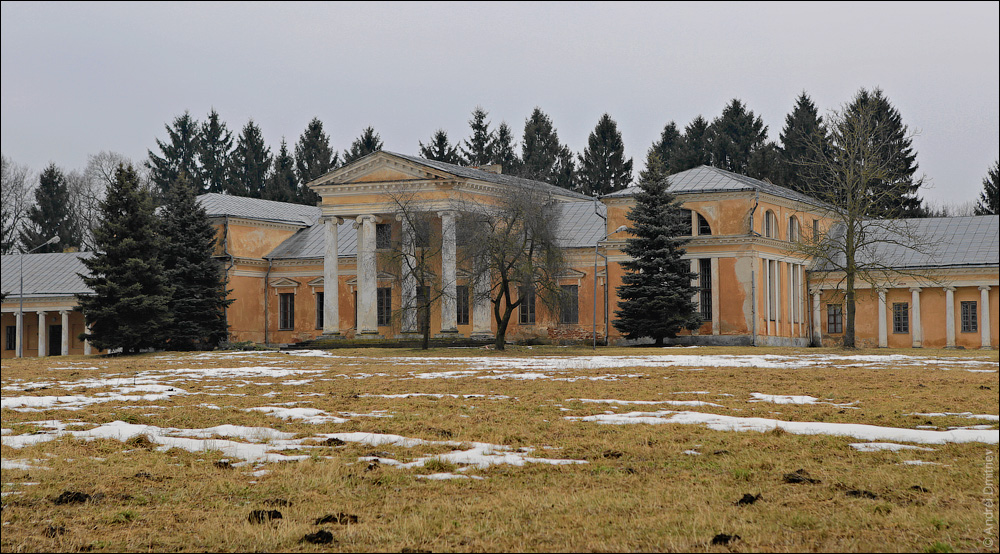 Сноўскі палац